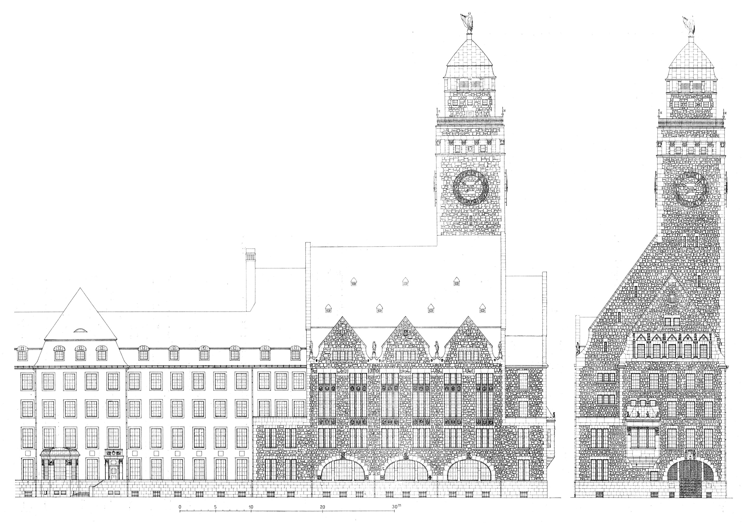 Berlin - Rathaus Neukölln (damals Rixdorf), Fassaden von Reinhold Kiehl